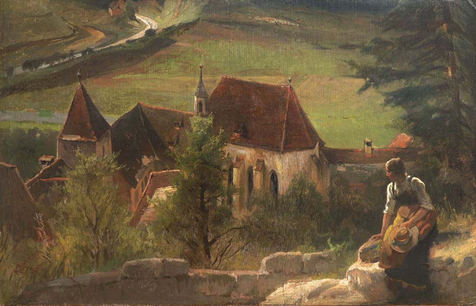 Blick auf das alte Augustinerkloster in Pappenheim